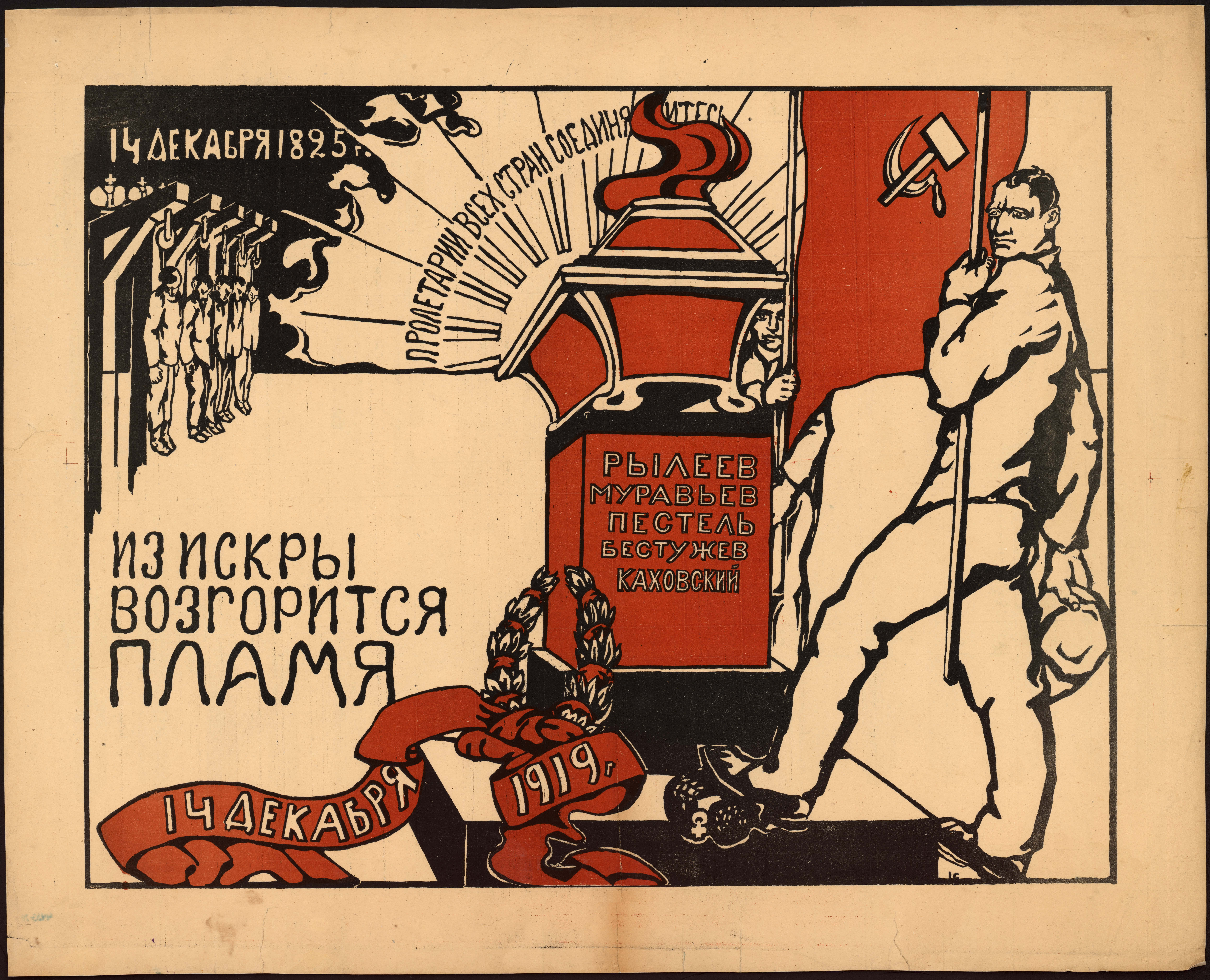 Из искры возгорится пламя. 14 декабря 1825 - 14 декабря 1919 [Изоматериал] : [Плакат]. - [Петербург] : Севцентропечать, 1919. - 1 л. : Цв. литогр.; 62 х 80 см. Рылеев, Муравьёв, Пестель, Бестужев, Каховский. Пролетарии всех стран соединяйтесь.